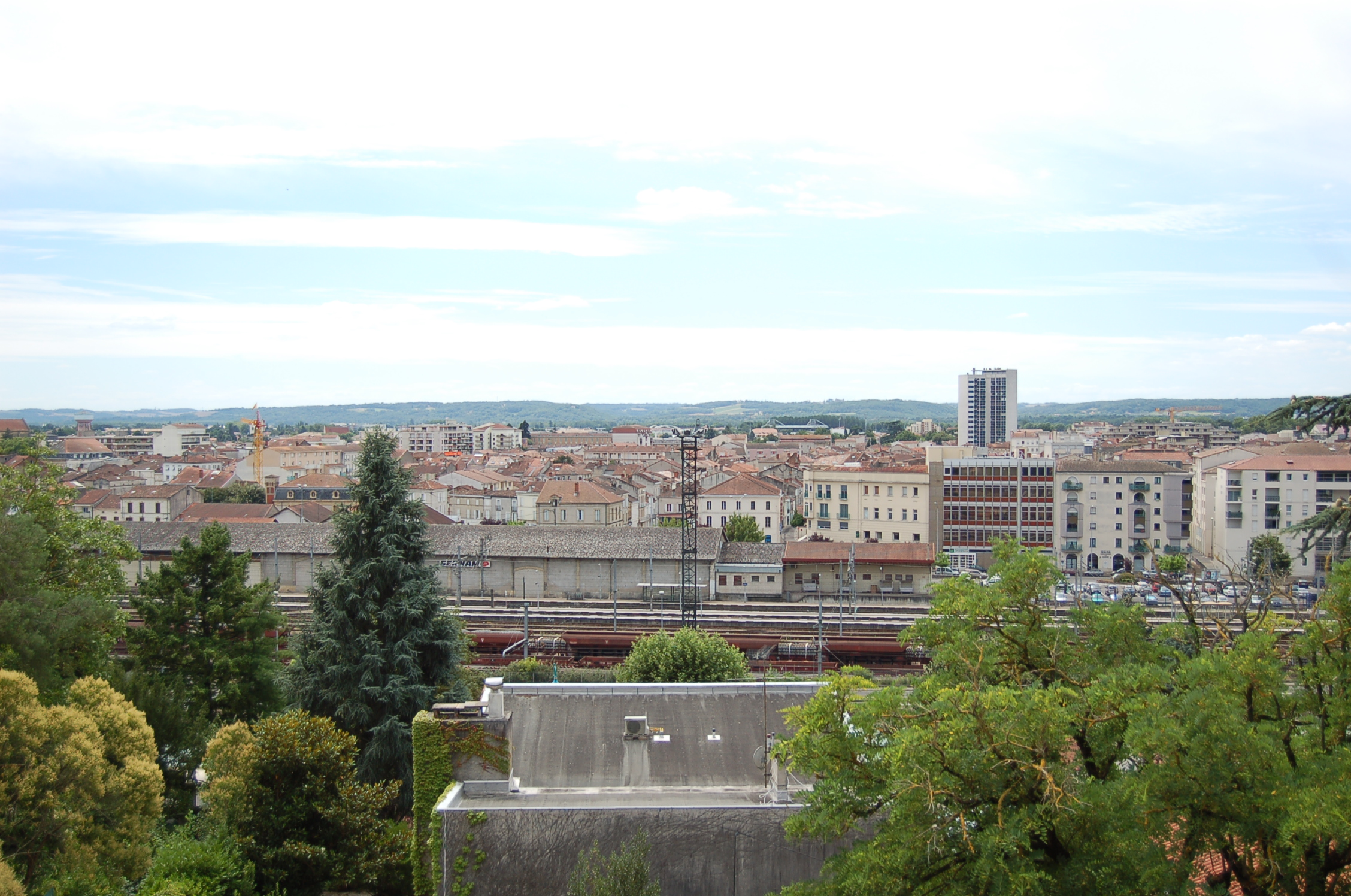 Vue depuis les hauteurs d'Agen